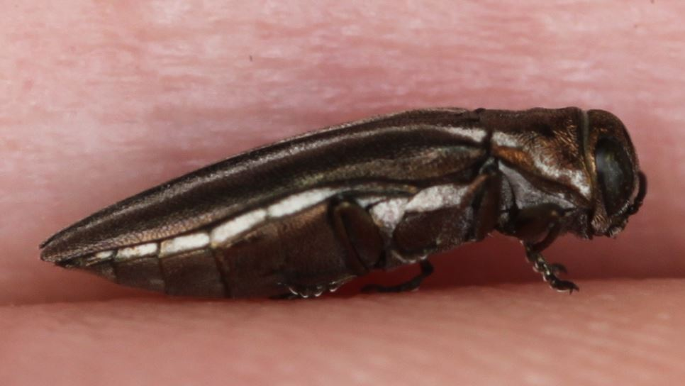 Umrandeter Schmalprachtkäfer (Agrilus cinctus) an Besenginster, am 12. Juni 2018 in der Schwetzinger Hardt